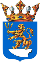 Blason de la ville de Bačka Topola en Serbie, Voïvodine